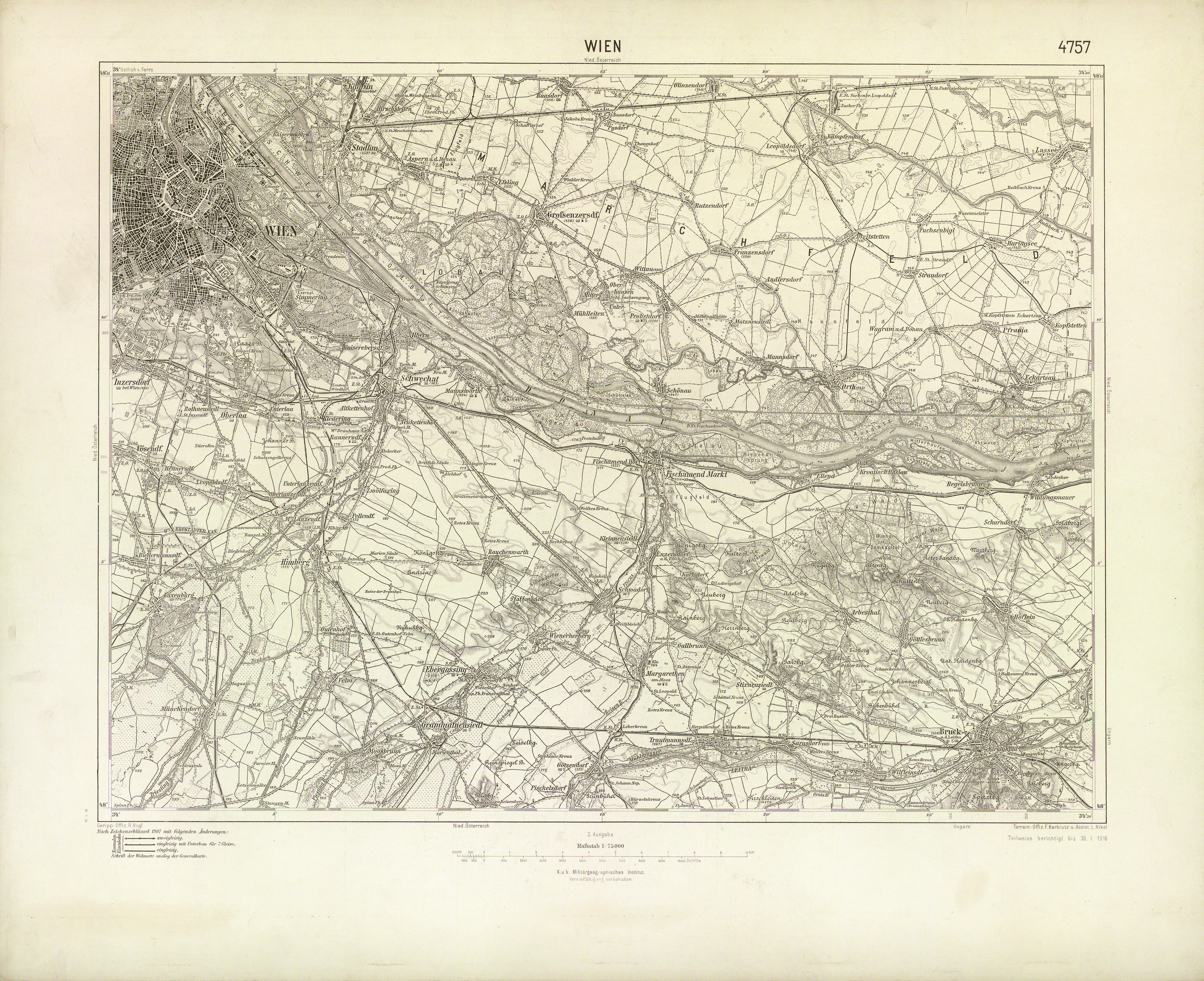 historische Landkarte: Spezialkarte 1:75.000, franzisco-josephinische (3.) Landesaufnahme der österreichisch-ungarischen Monarchie. Blatt Wien 4757 (Wien und östliche bzw. südliche Umgebung im Wiener Becken, mit Schwechat, Bruck an der Leitha, Himberg, Laxenburg, Stadlau, Großenzersdorf). 2. Auflage.